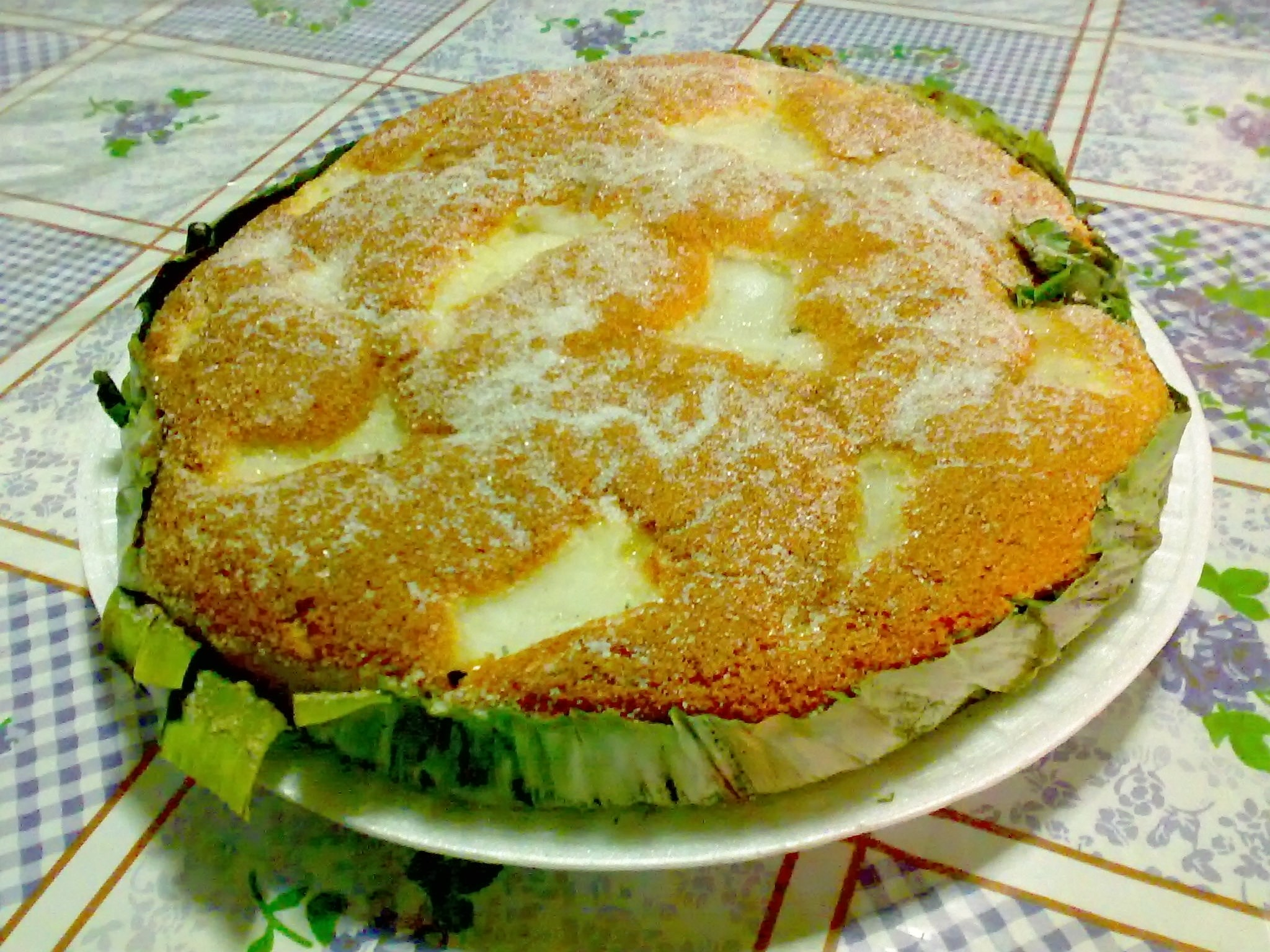 Large bibinka (bebinca).